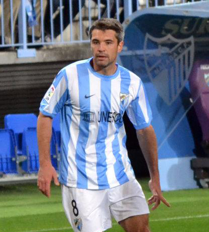 Jeremy Toulalan con el Málaga.